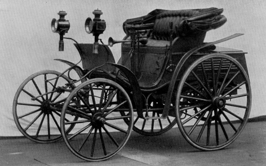 Abb. 33. Benz »Viktoria« von 1891, erfolgreich im Rennen Paris-Bordeaux-Paris